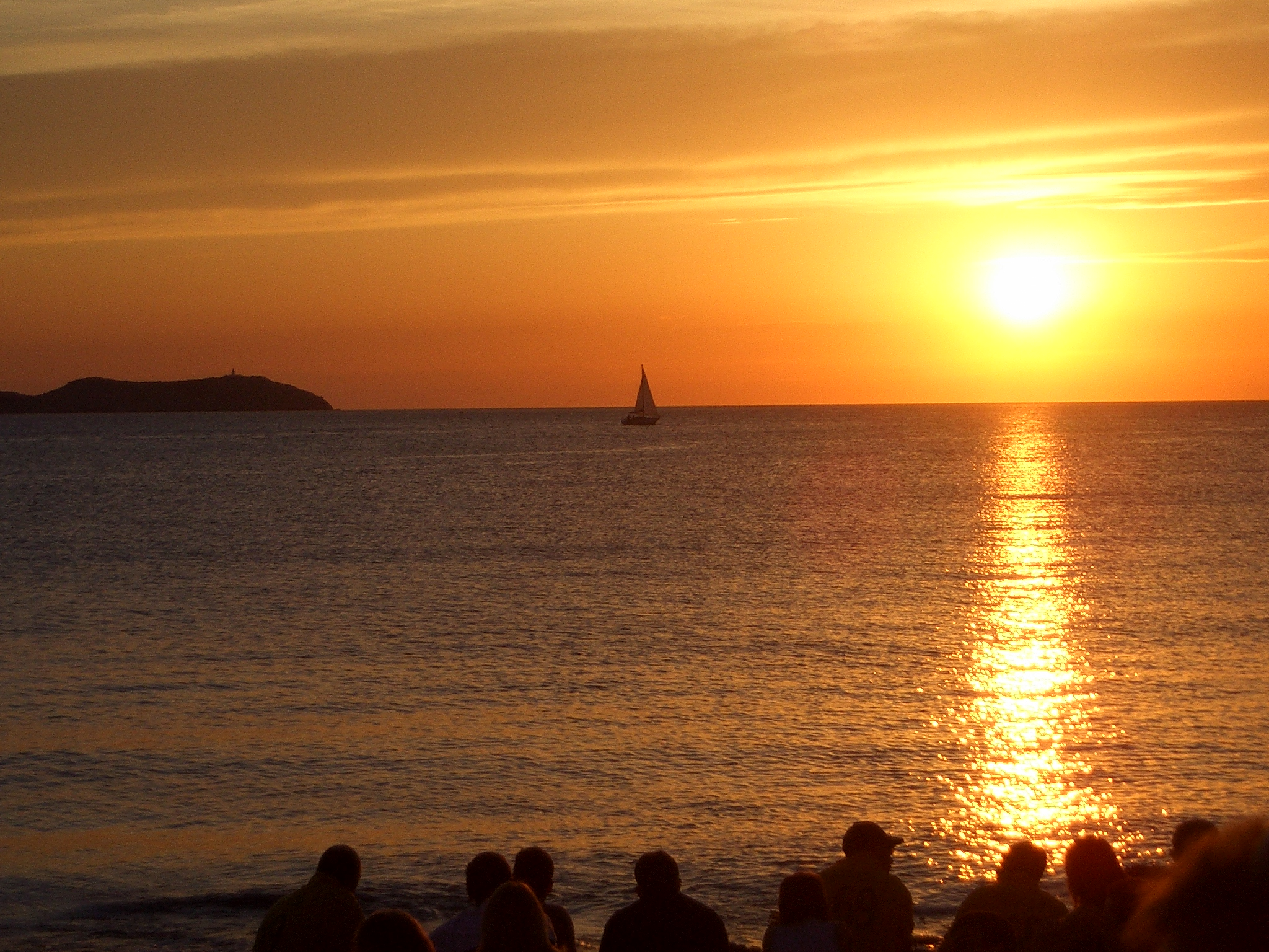 Cafe del mar sunset